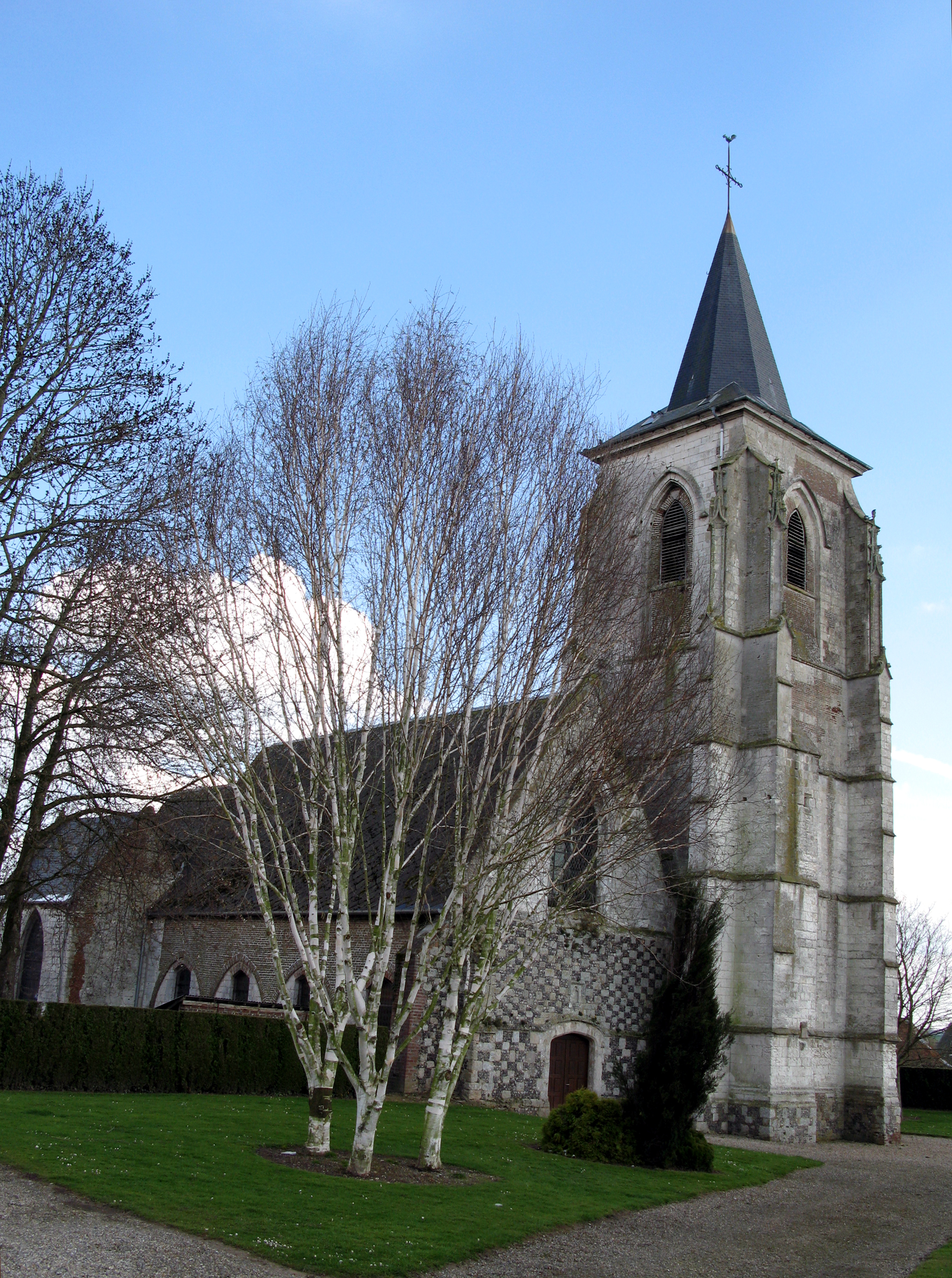 Franleu (Somme, France) - L'église, vue en venant de la mairie par une petite rue.